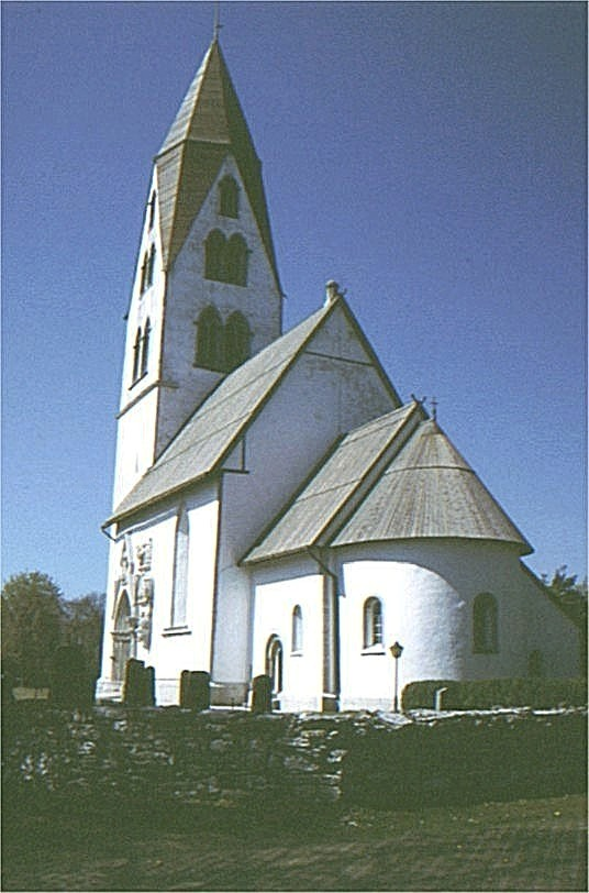 Stånga kyrka i Gotland, Sverige. Stånga kirke